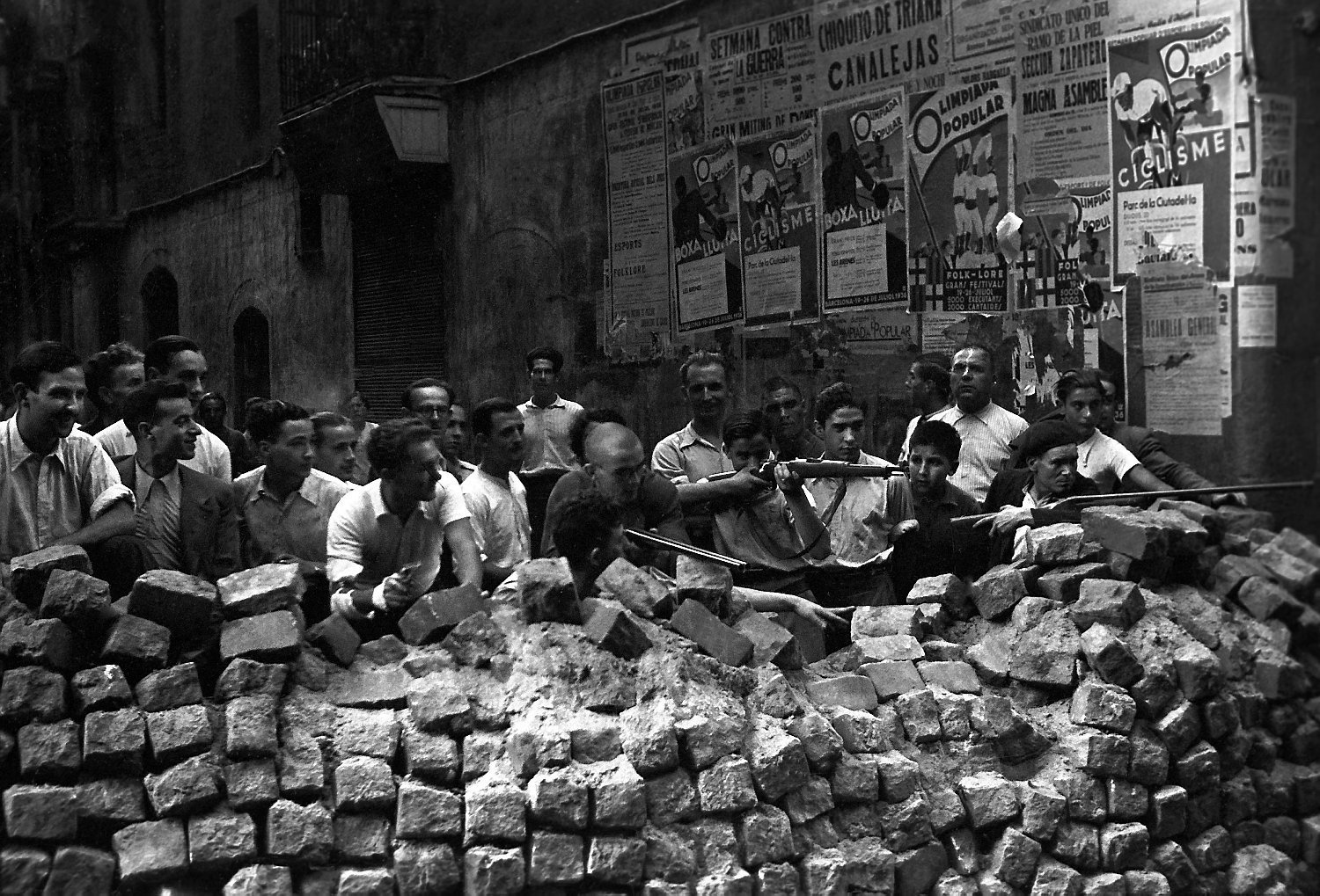 Barcelone 19 juillet 1936. Barricade après le soulèvement nationaliste en Espagne.